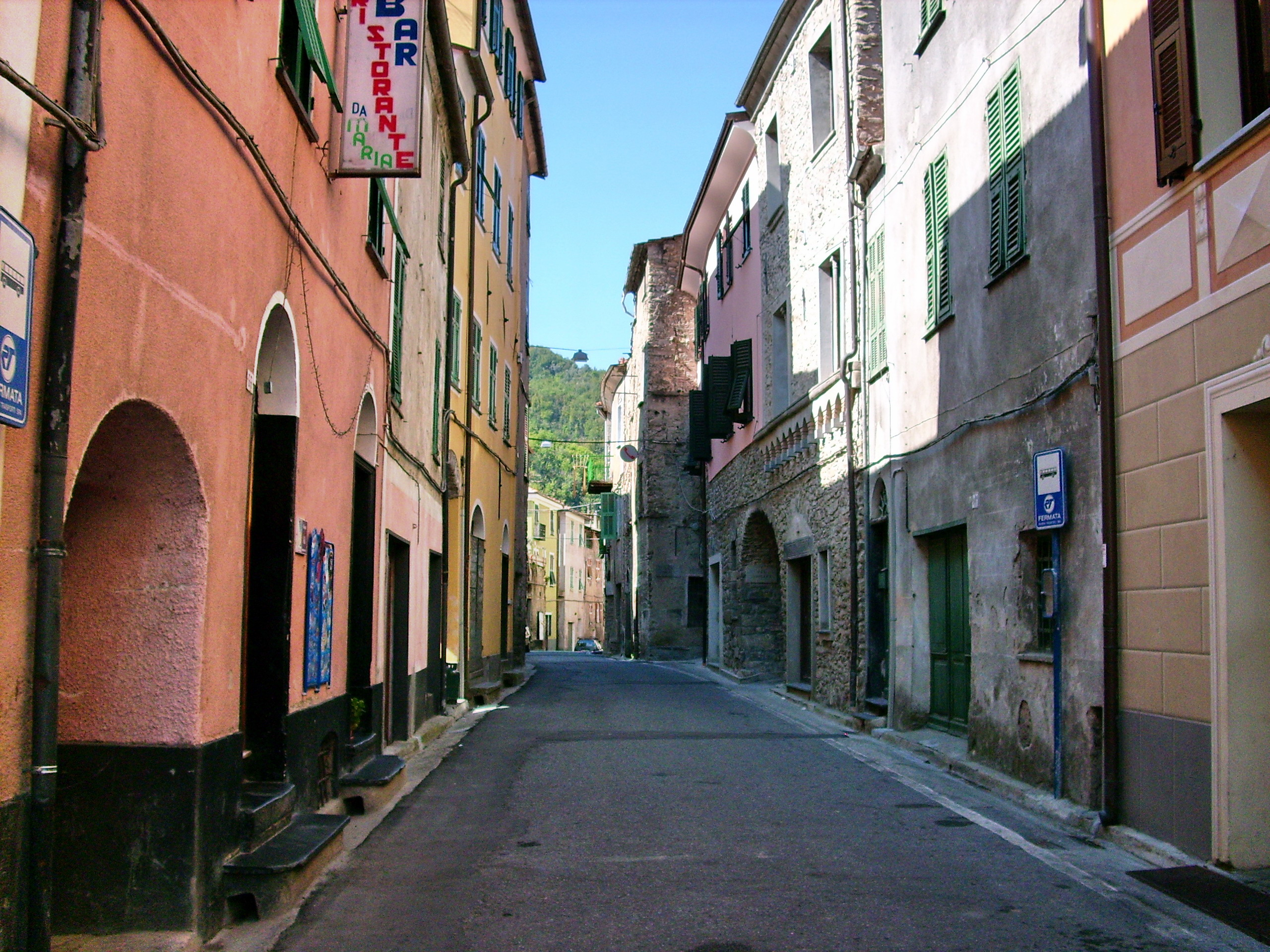 Centro storico di Vessalico, Liguria,Italia